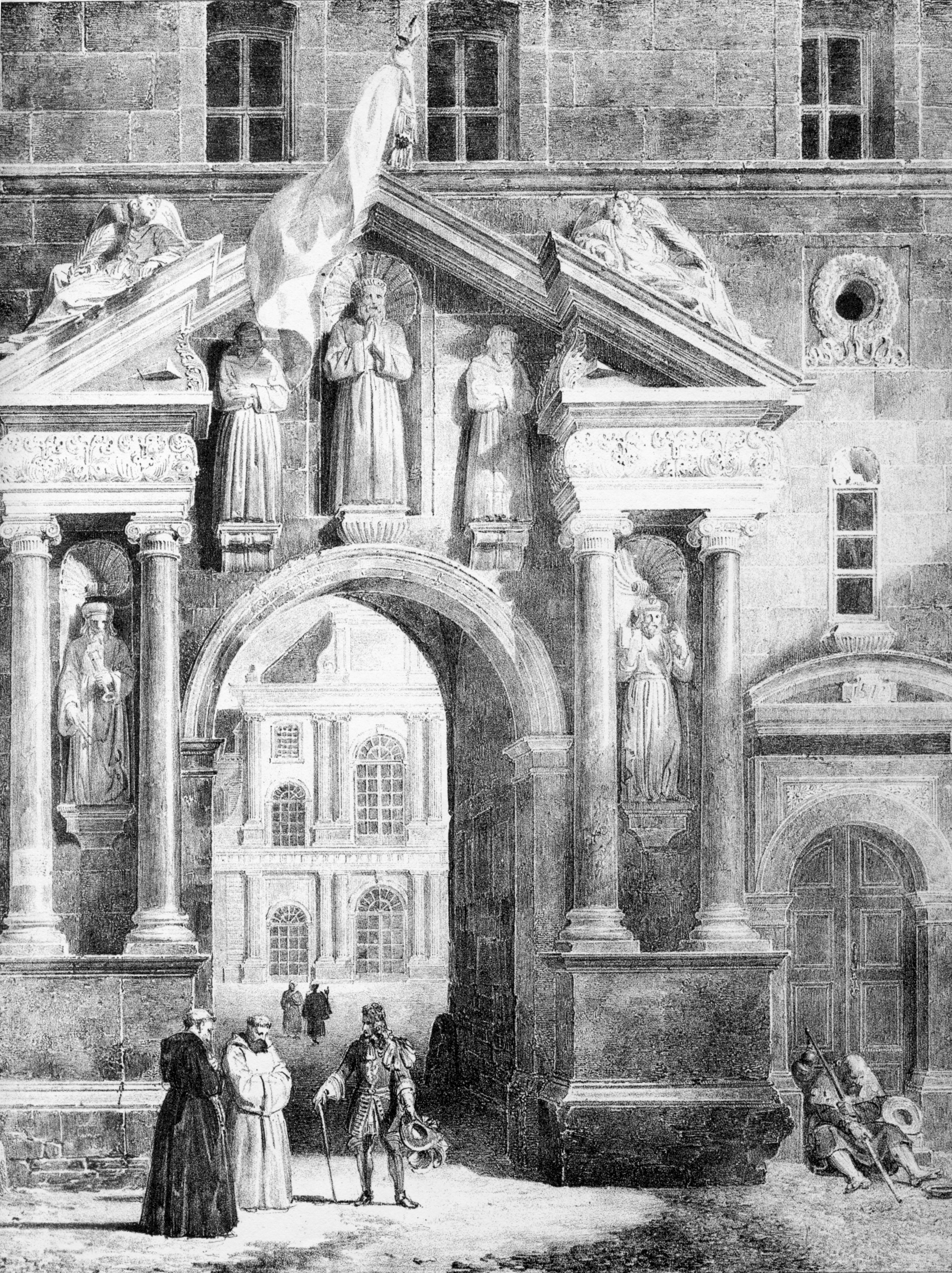 Le protail de l'ancien couvent des cordeliers à Dôle